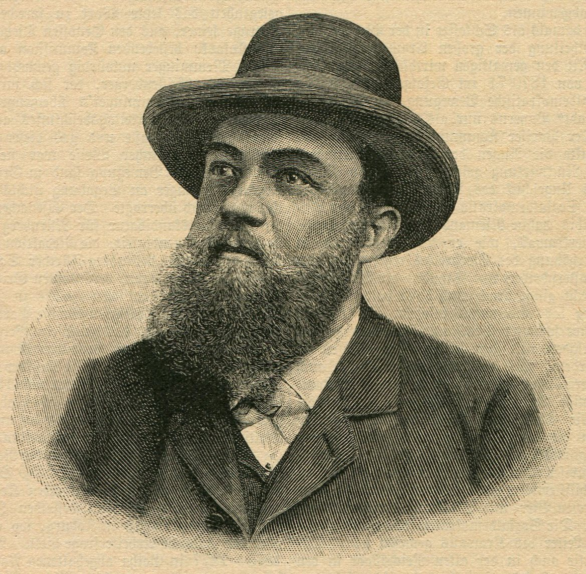 Holzschnitt von Karl Grillenberger